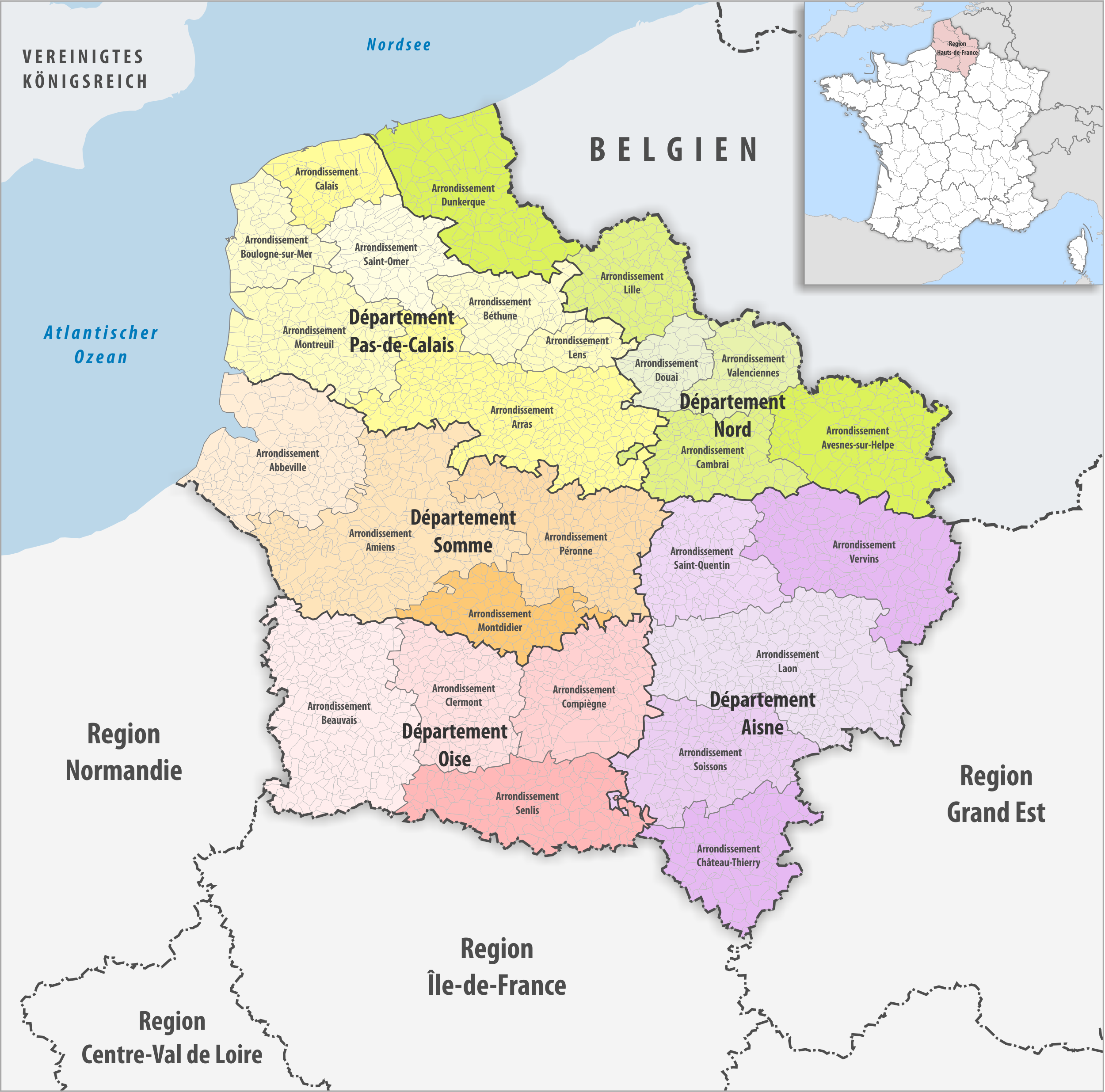 Gemeinden, Arrondissemente und Departemente in der Region Hauts-de-France